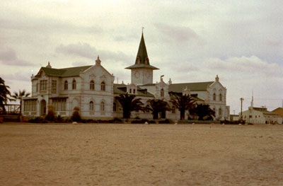 Der alte Bahnhof, heute Hotel und Casino